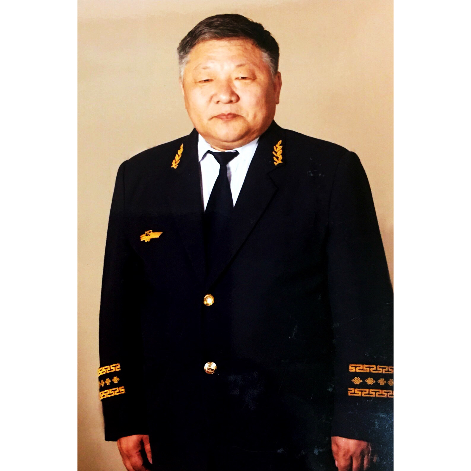 Монгол: УБТЗ-ын Хэрэг эрхлэх газрын дарга 1991-2004